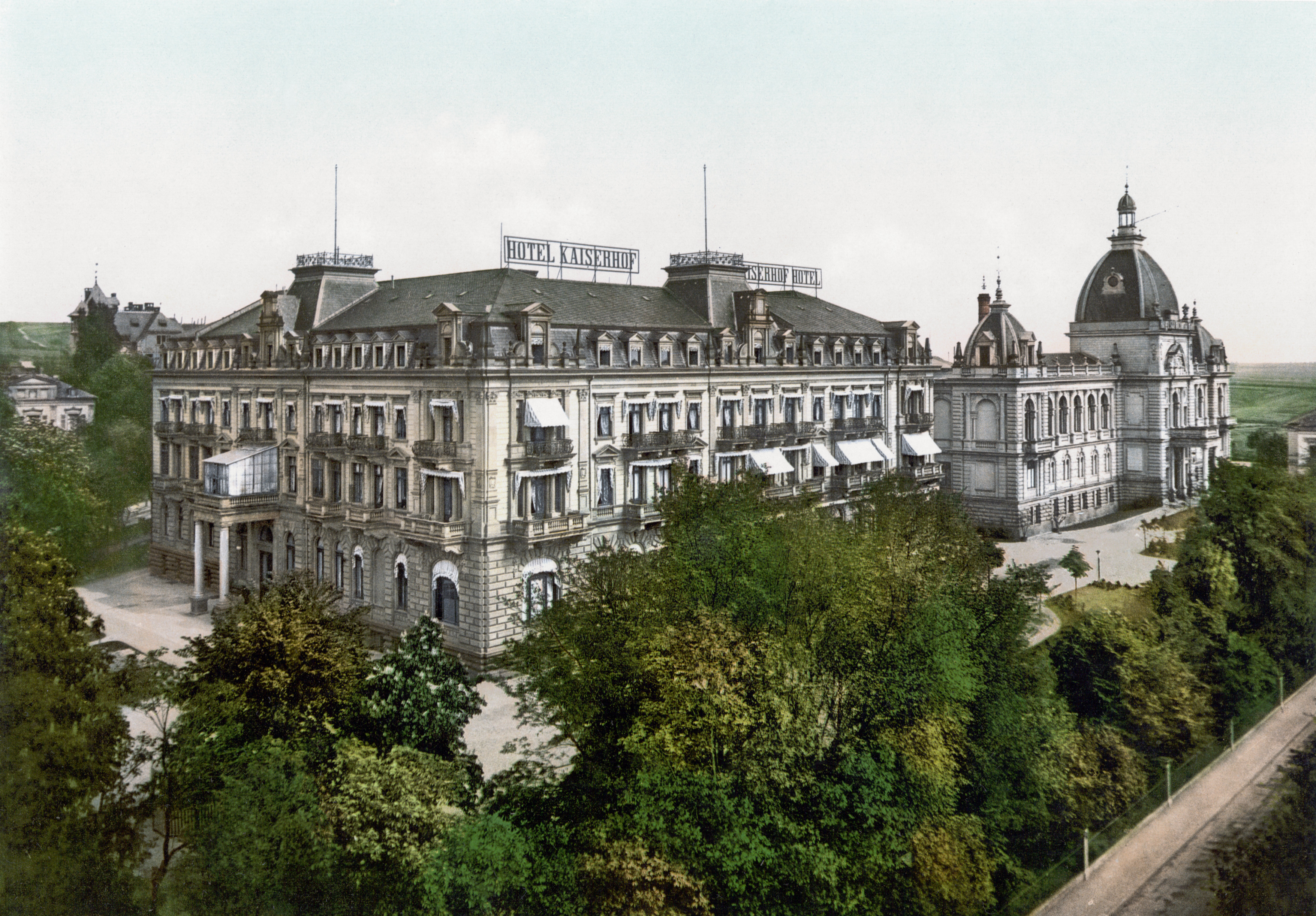 Das frühere Hotel Kaiserhof mit dem luxuriösen Augusta-Victoria-Bad in der Frankfurter Straße von Wiesbaden.